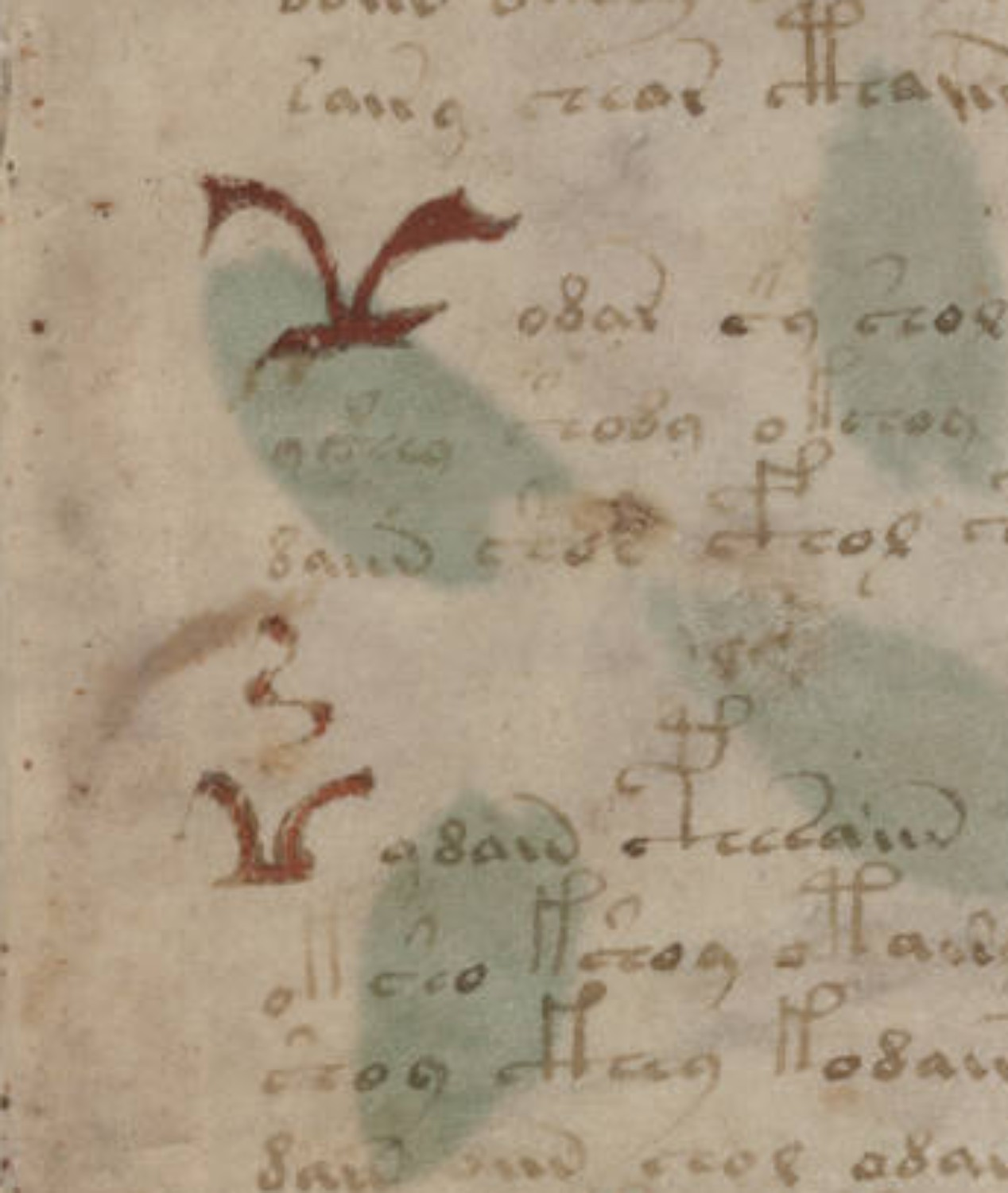 Détail du folio 1r où apparaissent deux grands symboles rouges.